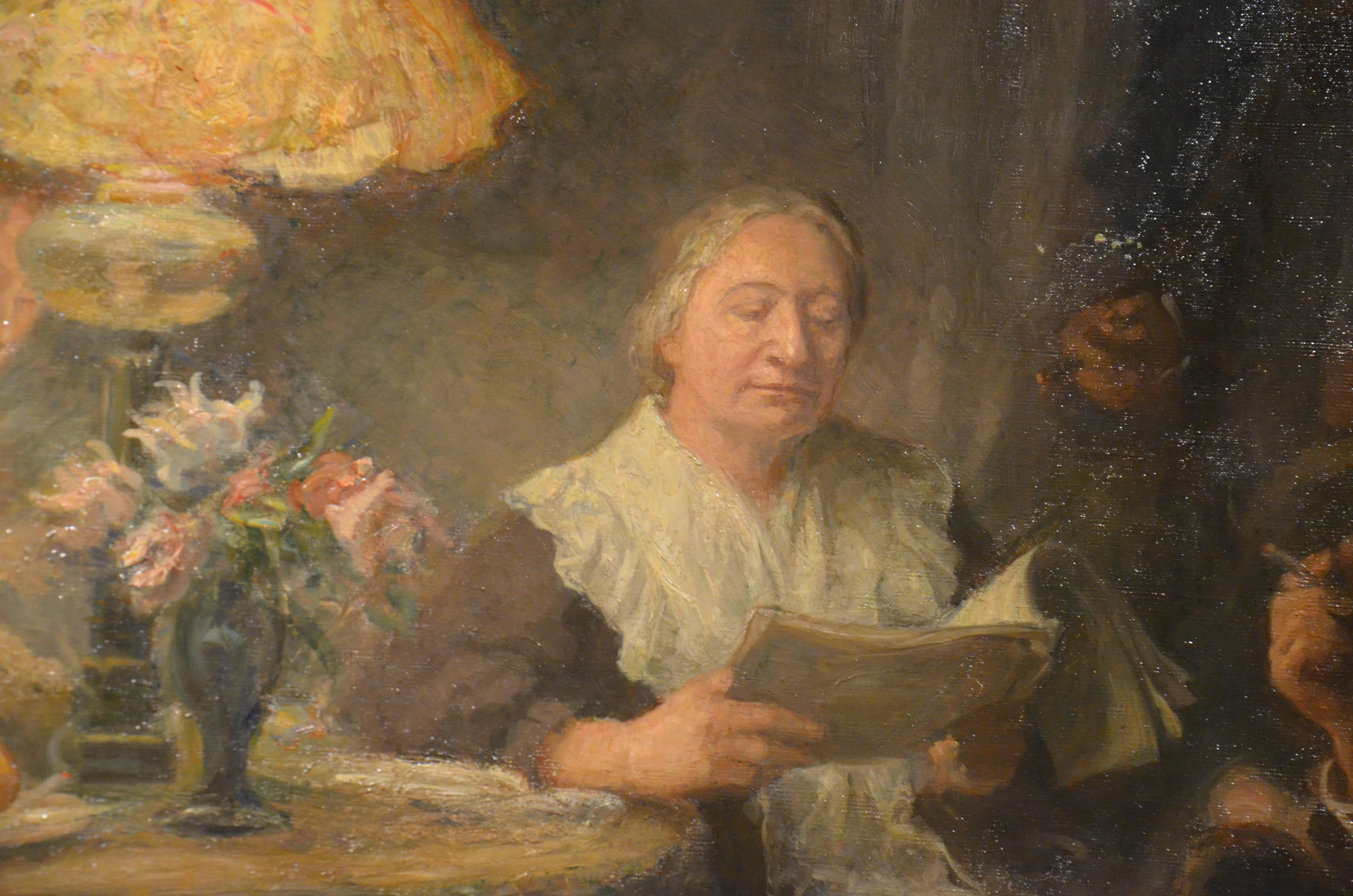 Portrait of Ellen Keydetail: painting Vänner